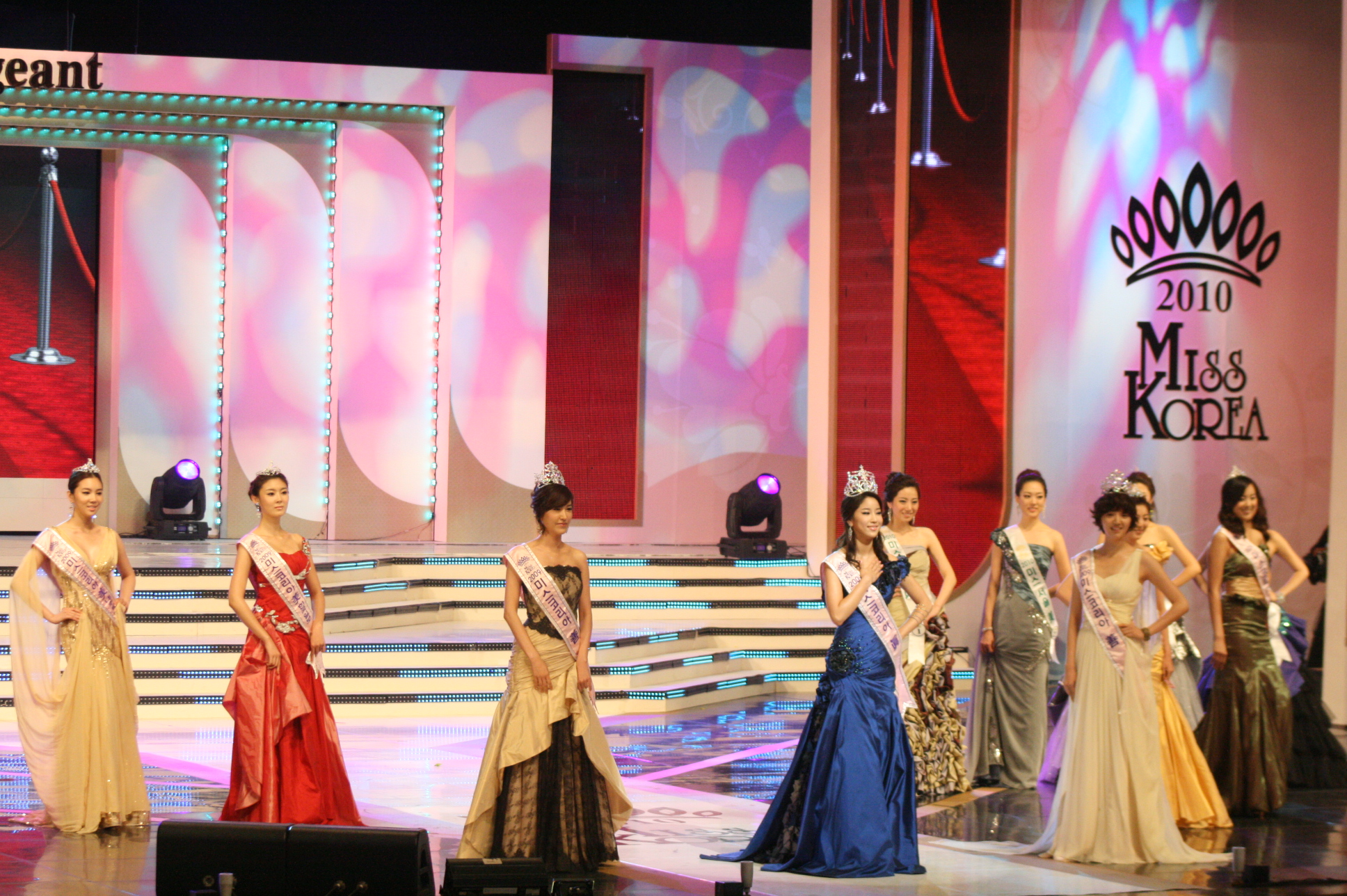 2009 미스코리아 당선자들